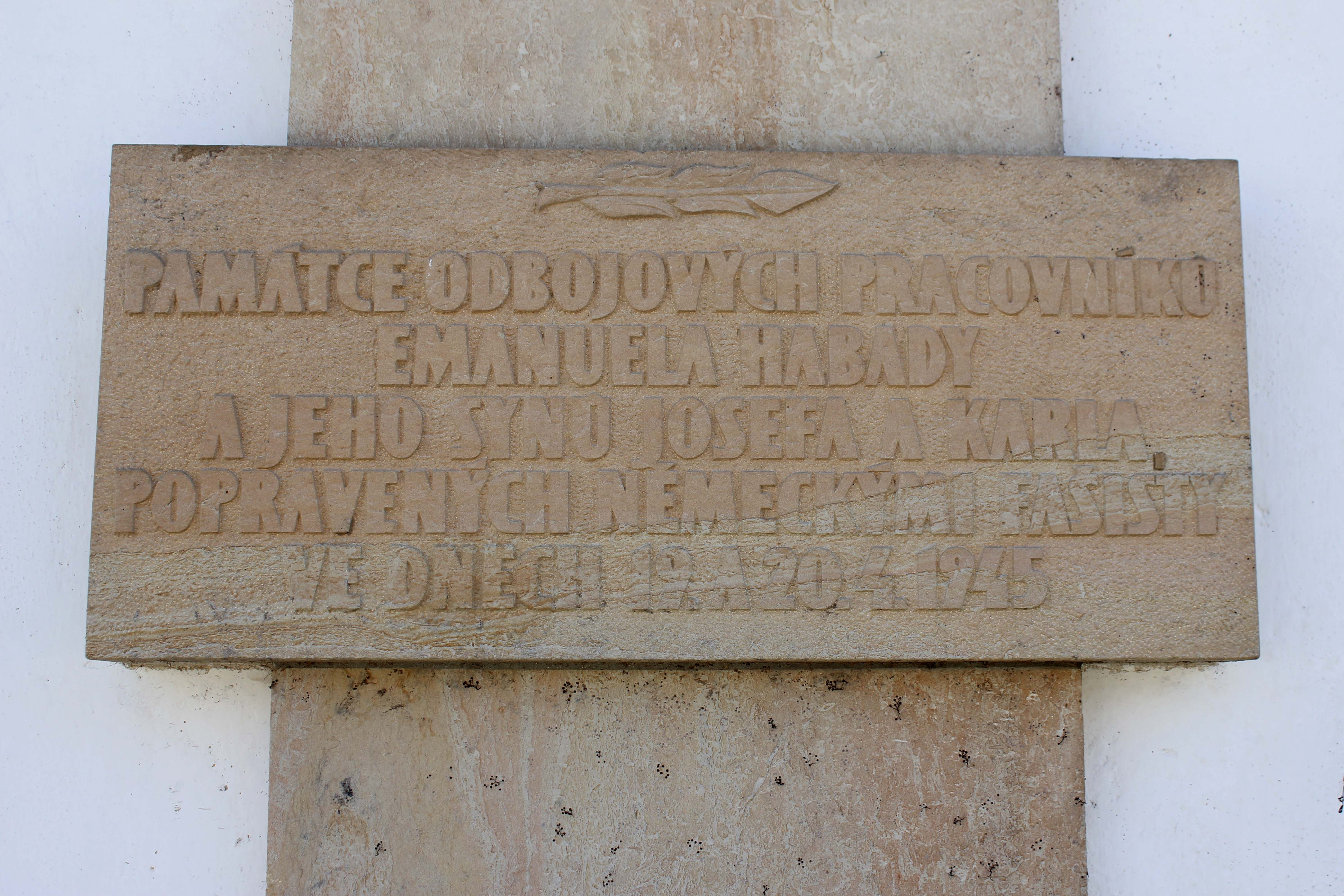 Pamětní deska, dům Habadových v Bězděkově pod Třemšínem